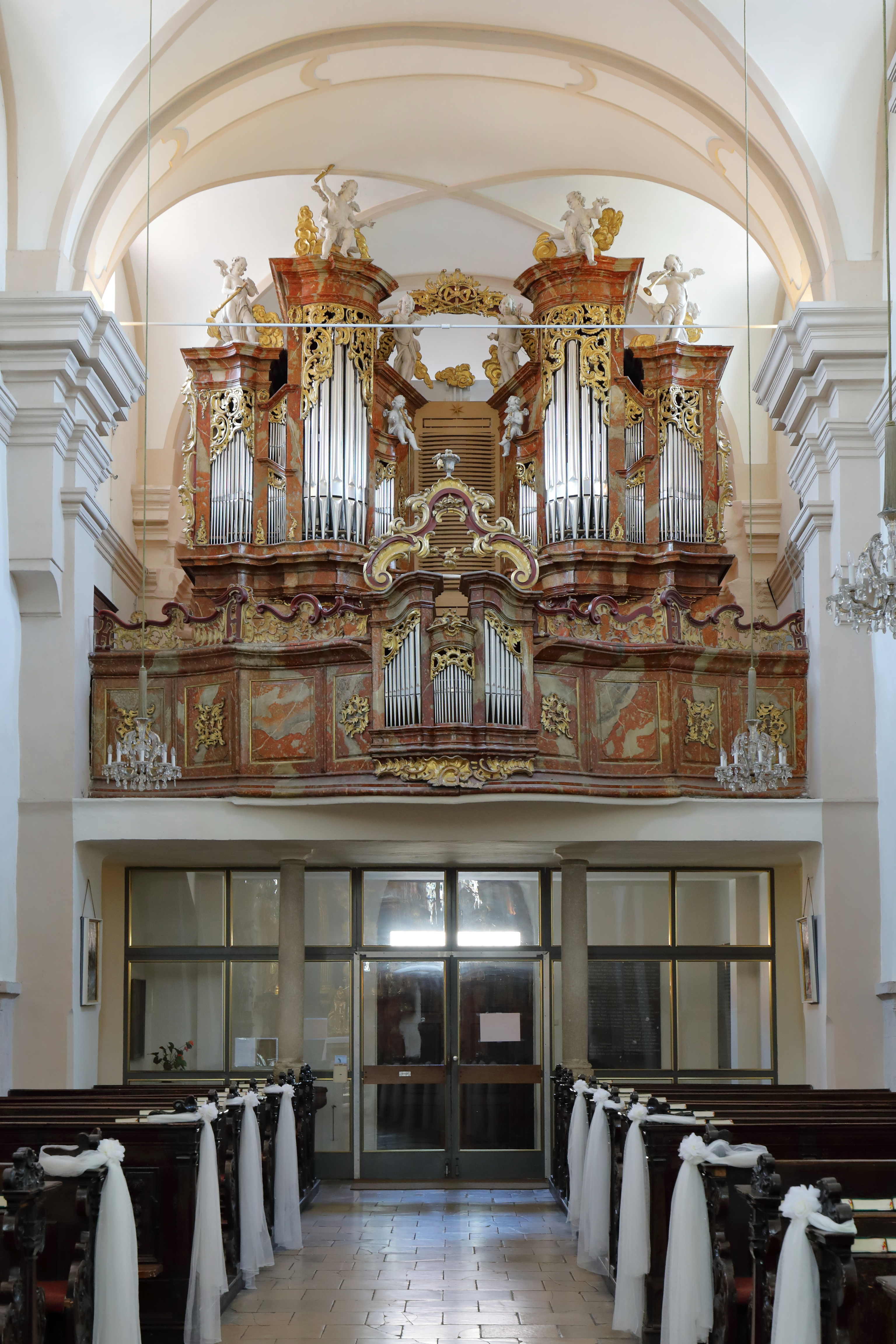 Die Orgel der röm.-kath. Pfarrkirche hl. Josef in der niederösterreichischen Stadt Groß-Enzersdorf. Das barocke Orgelgehäuse stammt aus dem Jahr 1773 als Josef Silberbauer aus Znaim im Zuge der Barockisierung der Kirche eine neue Orgel installierte. 2017 wurde von der belgischen Orgelbaufirma "Manufacture d'orgues Thomas" eine neue Orgel in das bestehende Gehäuse eingebaut. Die neue Orgel hat über 1.600 Pfeifen sowie 26 Register verteilt auf 3 Manuale und Pedal. Der Umbau mit Renovierung des alten Gehäuse verursachte Kosten von rd. 500.000 Euro.